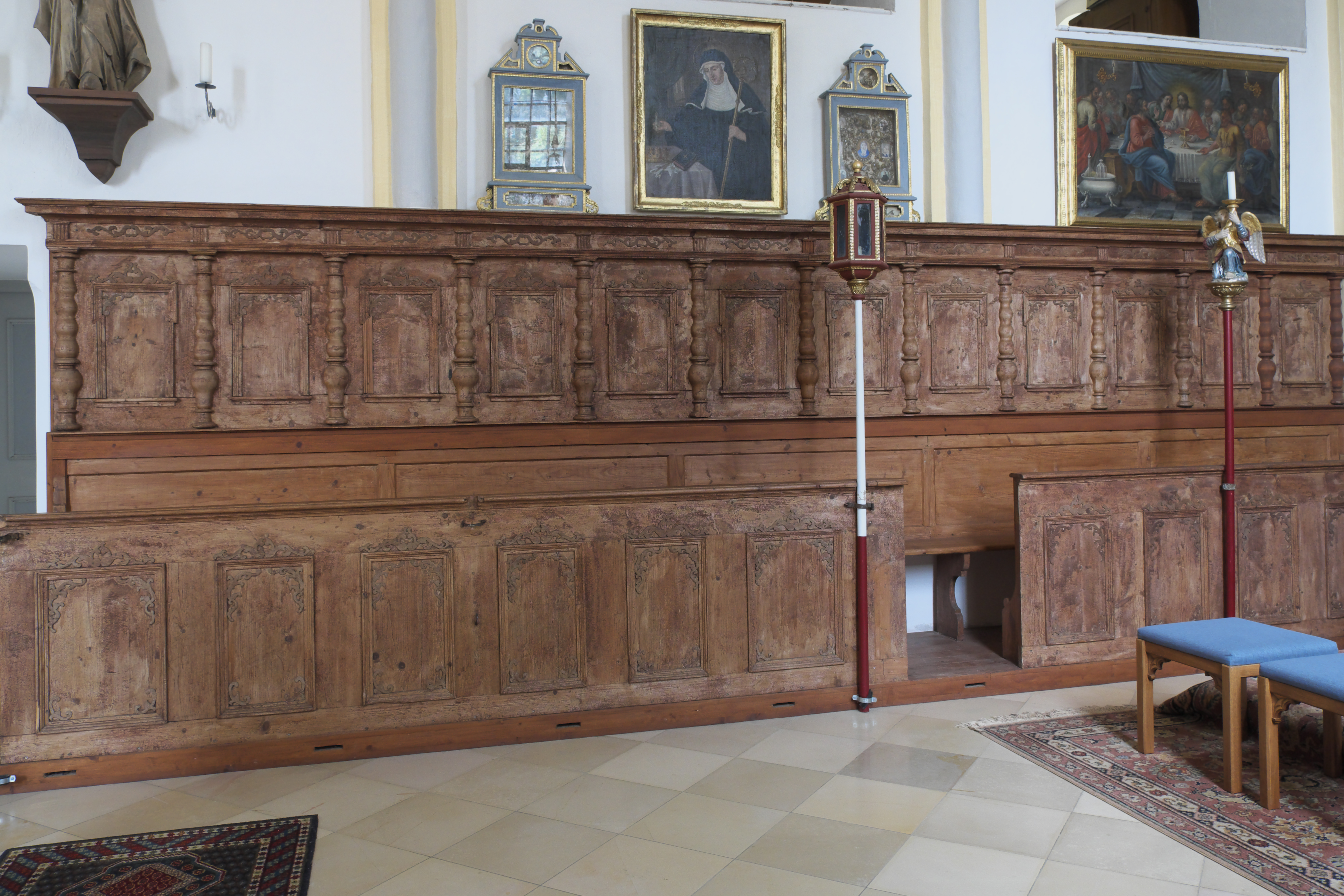 Katholische Filialkirche St. Peter und Paul in Holzkirchen (Alling) im Landkreis Fürstenfeldbruck (Bayern/Deutschland), Chorgestühl